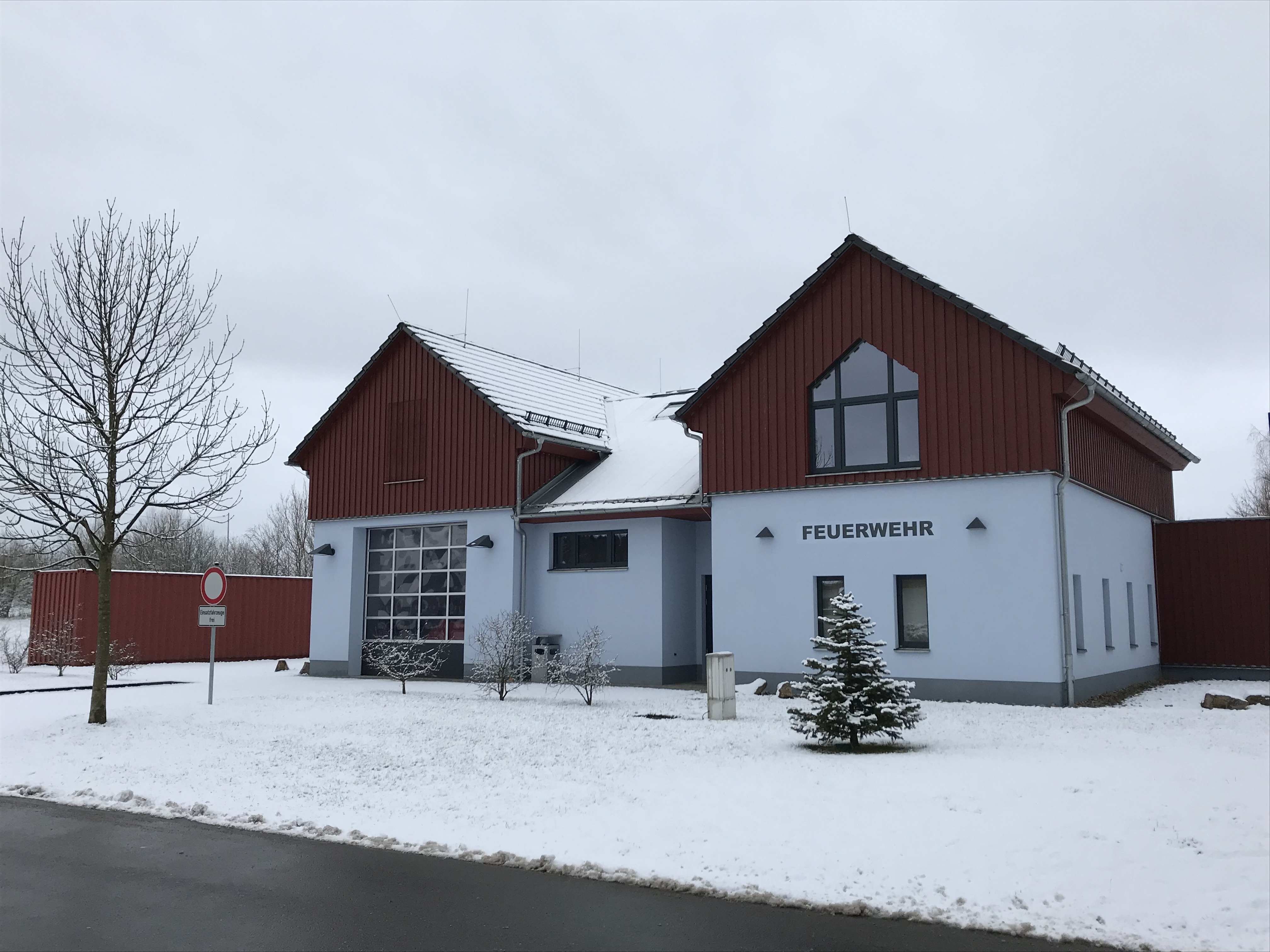 Feuerwehrgerätehaus der Freiwilligen Feuerwehr Plohn